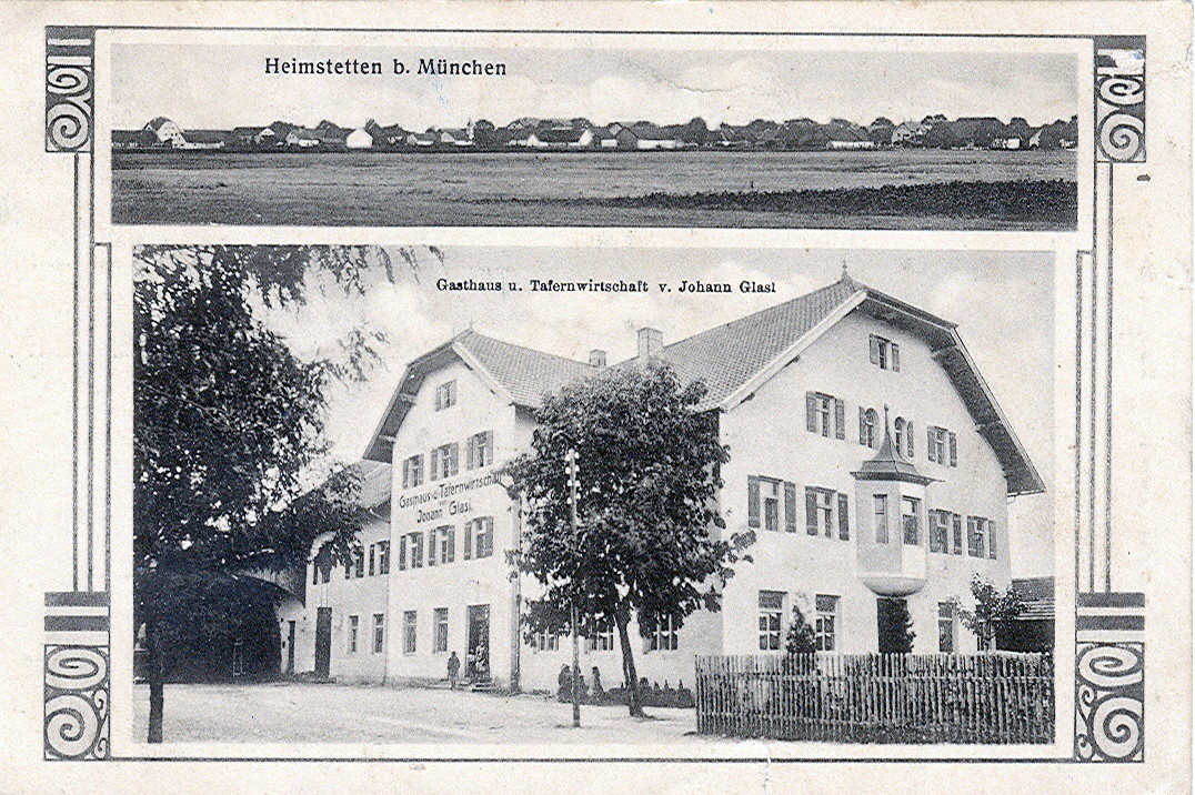 Postkarte, datiert 4.12.1918. Beschriftung: "Heimstetten b. München - Gasthaus und Tafernwirtschaft von Johann Glasl."